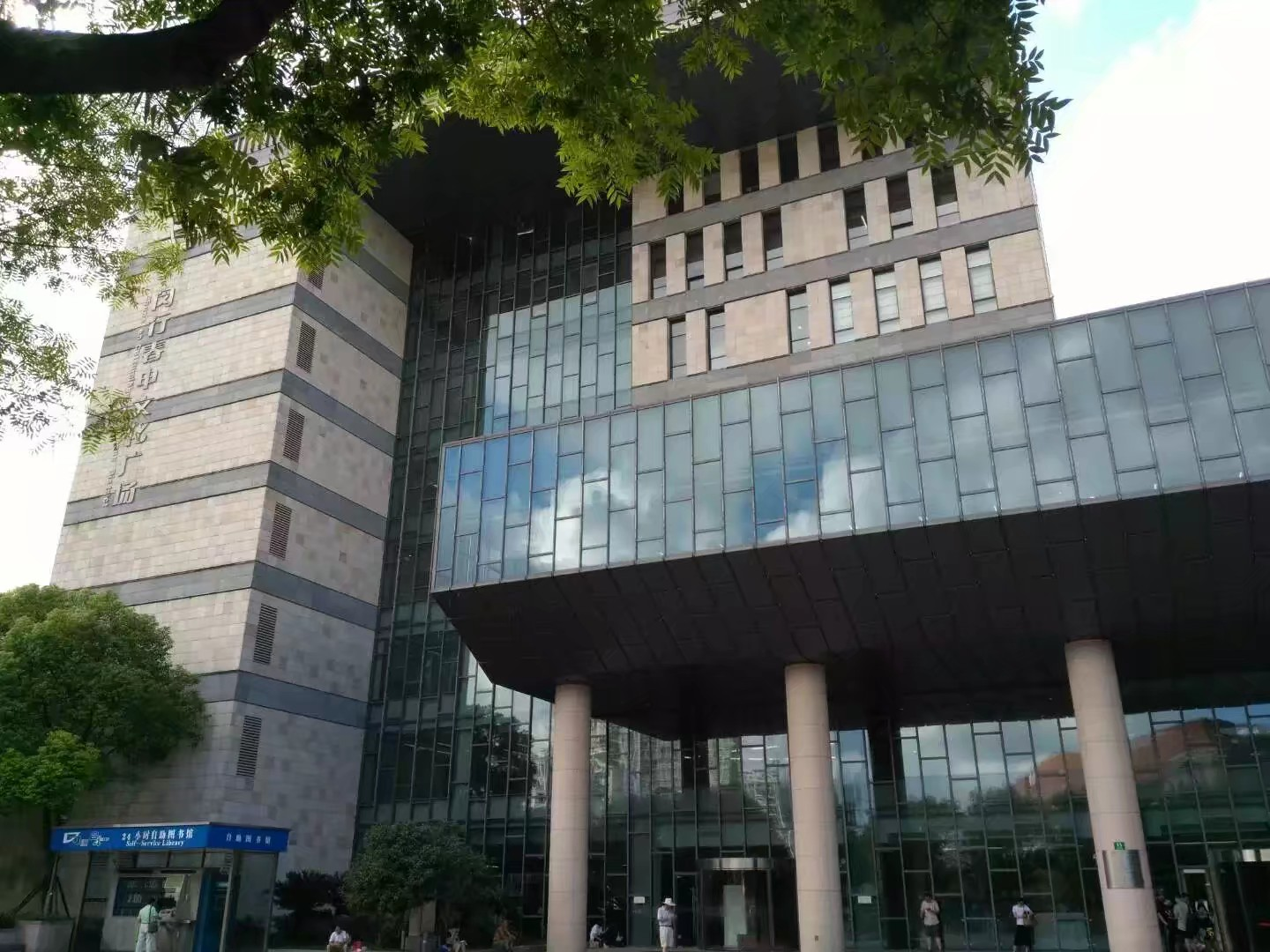 春申文化广场南门，即闵行区图书馆、闵行区博物馆临时馆址和闵行区档案馆入口。